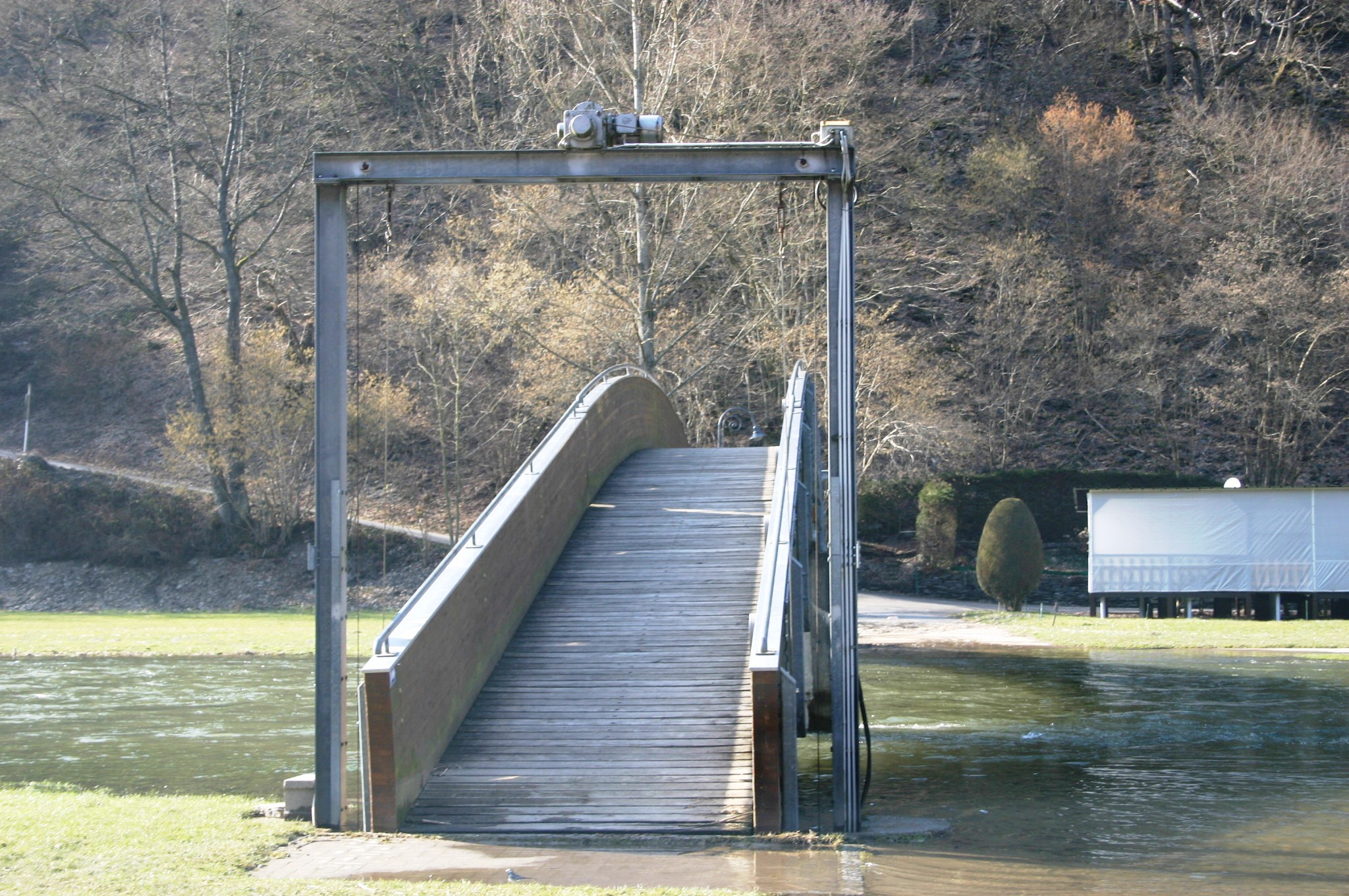 Fousgängerbréck op der Buerschtermillen.